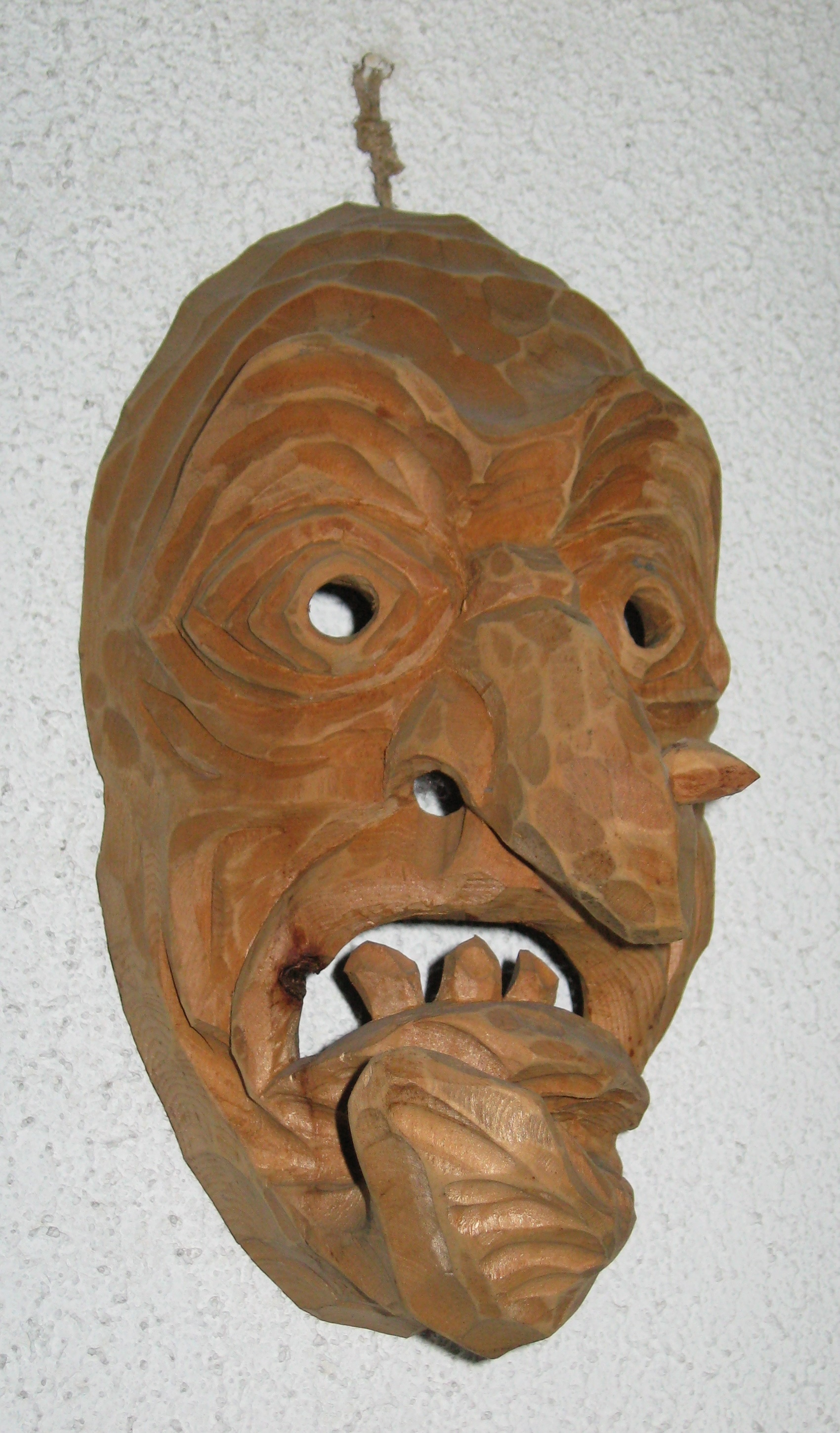 Typische Prettauer Holzmaske Datum: 17.07.2010 Urheber: Michael Pfeiffer Quelle: privates Fotoarchiv des Urhebers Hinweis: Käuflich erworbene Holzmaske - im Eigentum des Foto-Urhebers